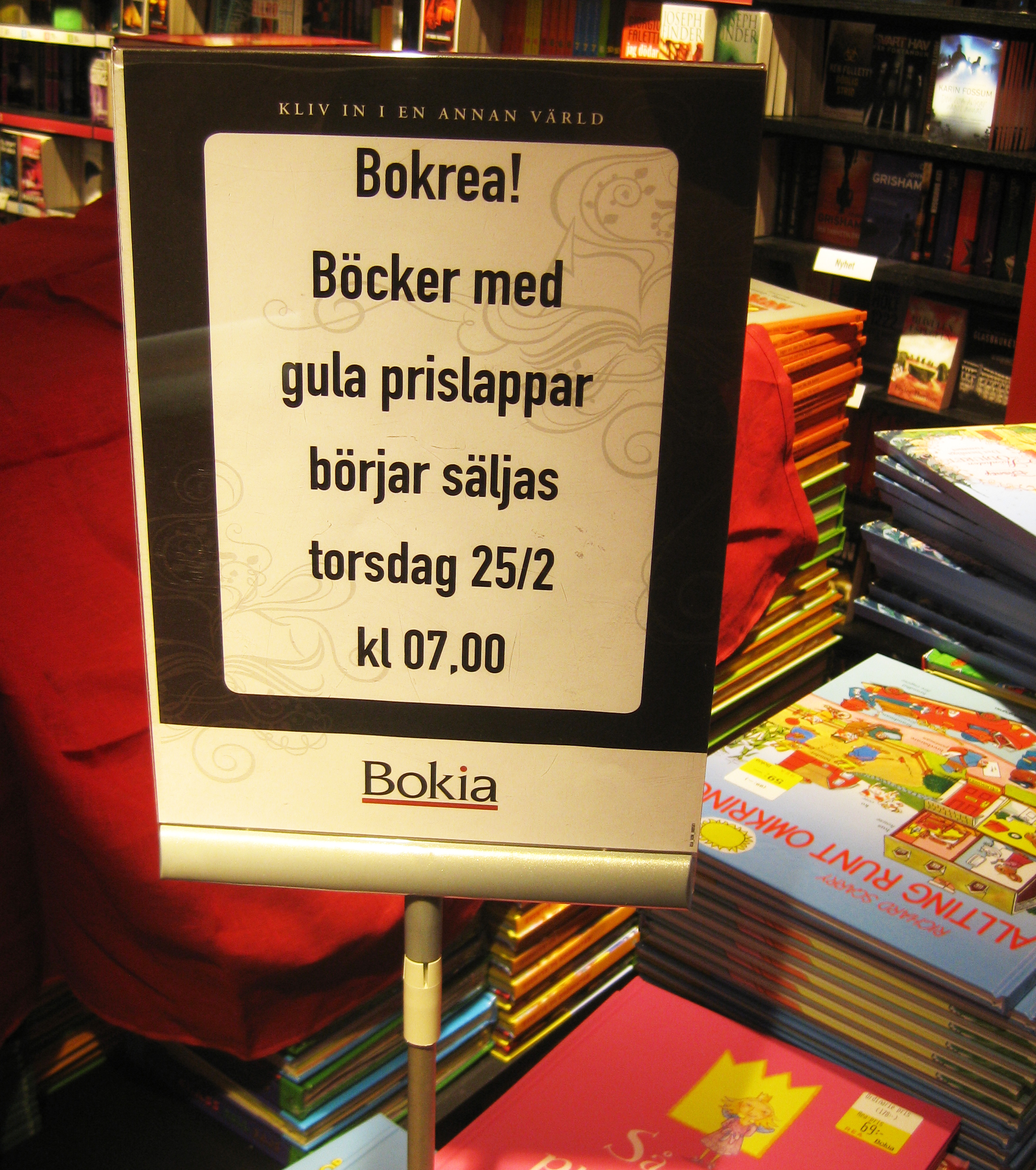 Informationsskylt inför Bokrean 2010.